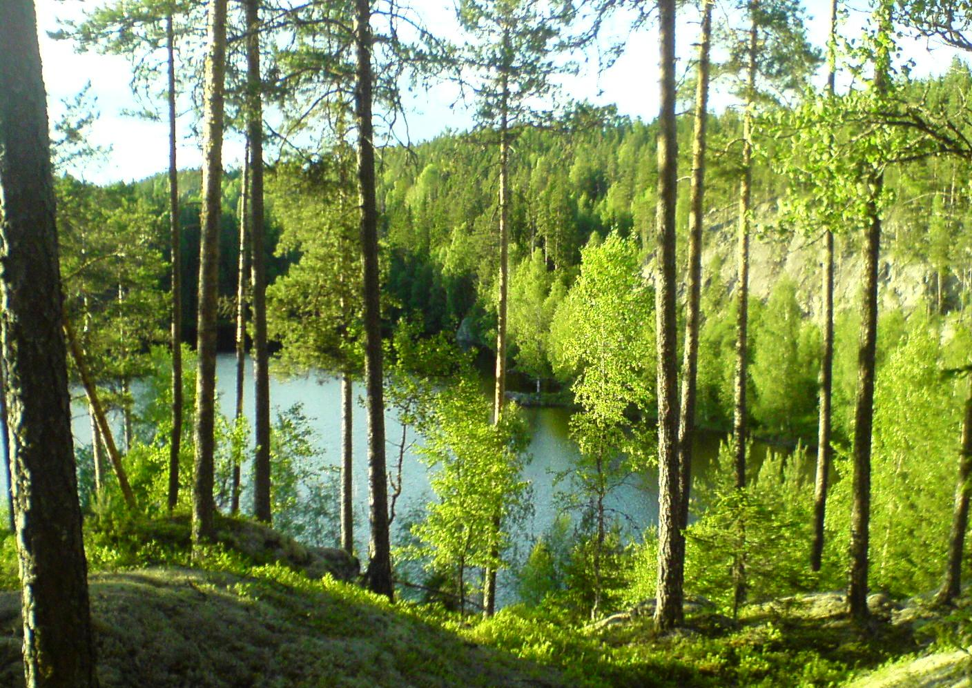 Morttjenn nord for Lierfoss i Aurskog-Høland kommune.